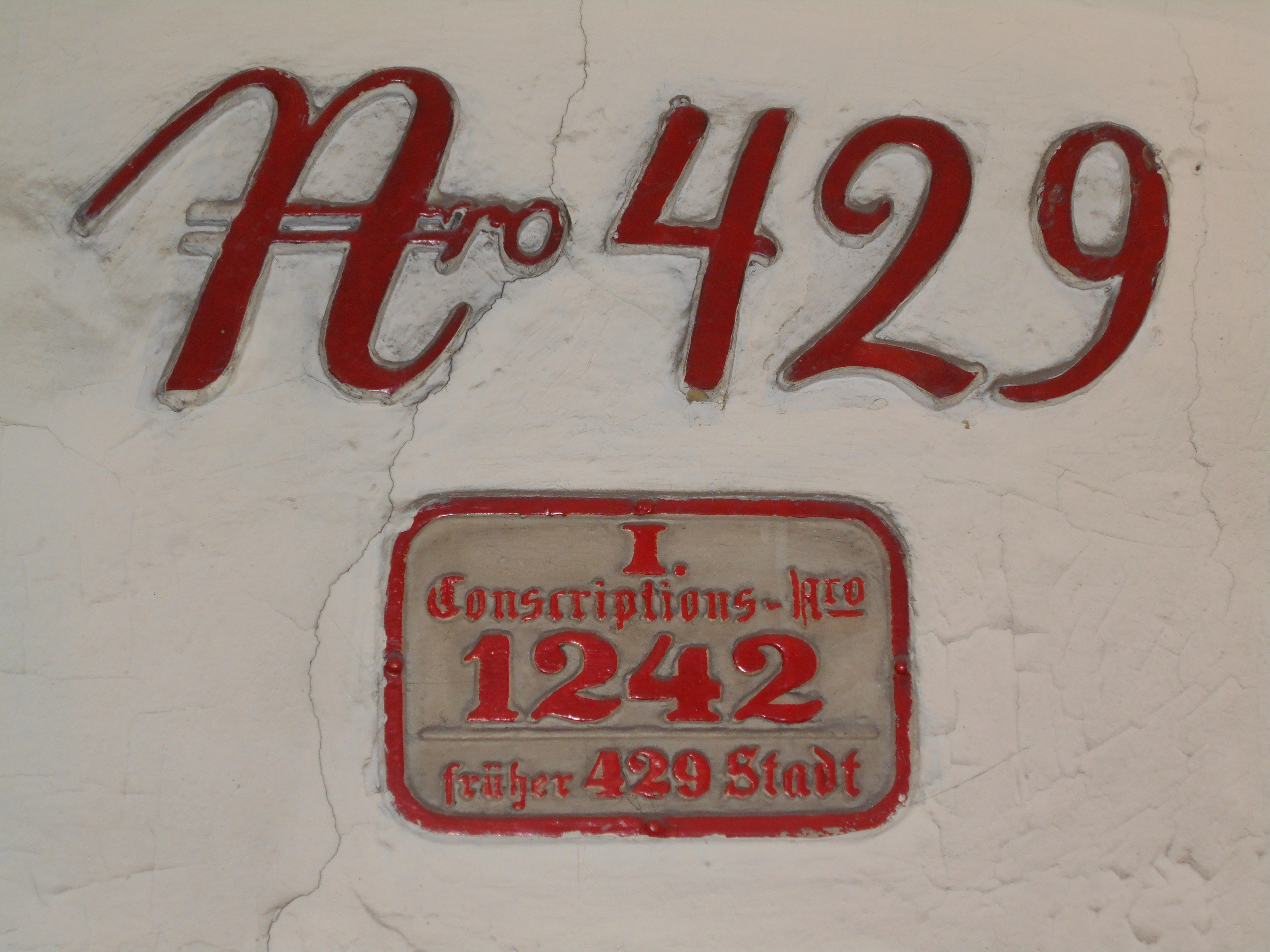 Gösser Bierklinik, Konskriptionsnummer im Hauseingang